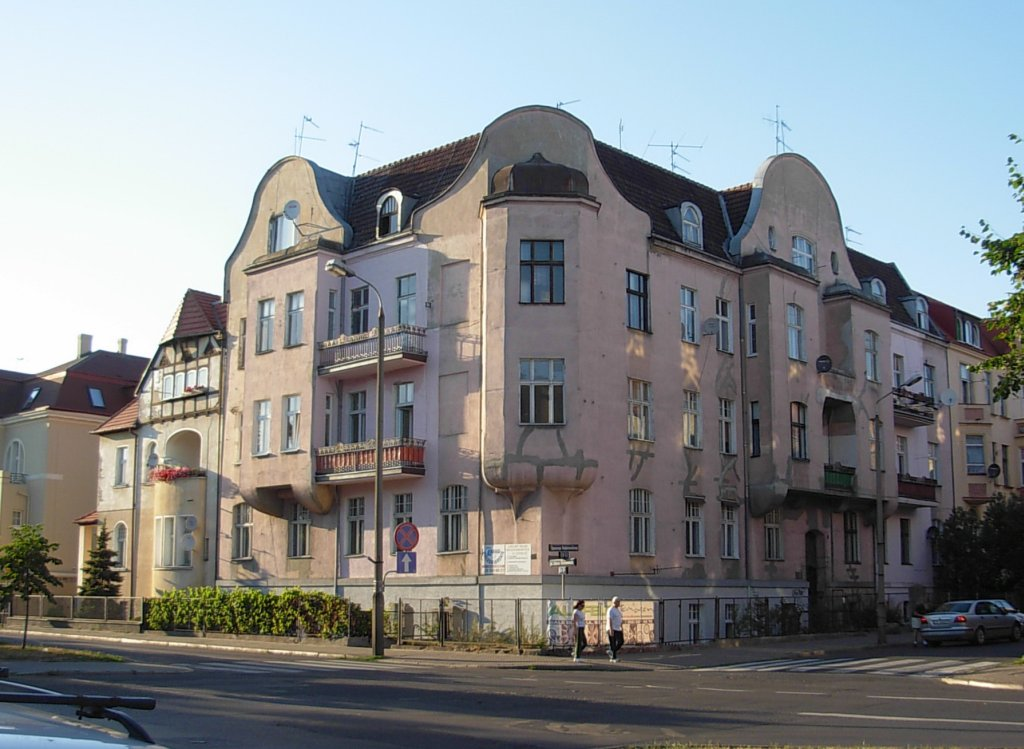 Aleja Adama Mickiewicza w Bydgoszczy